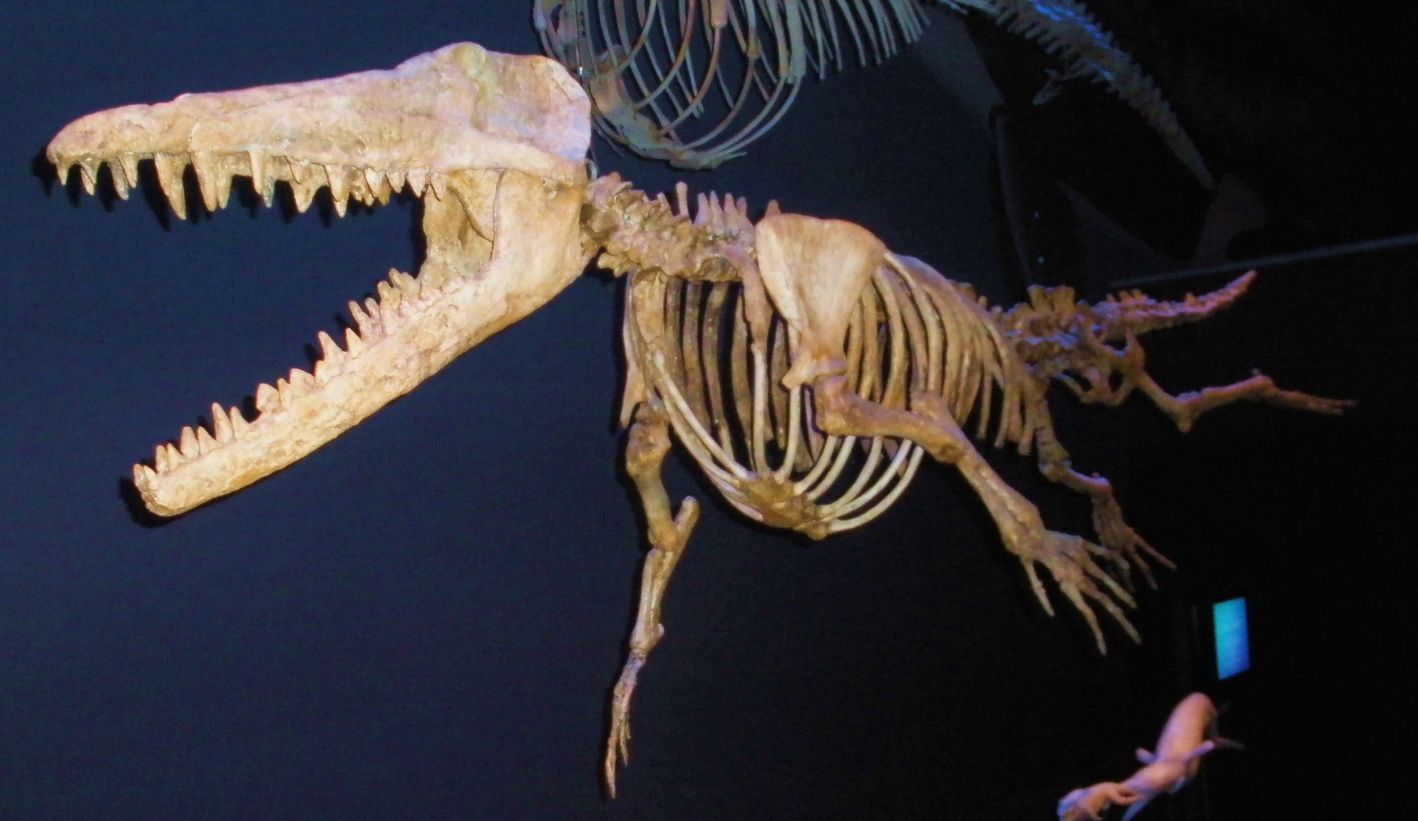 Fossil of Ambulocetus, an extinct whale- Took the photo at Naturalis museum, Leiden